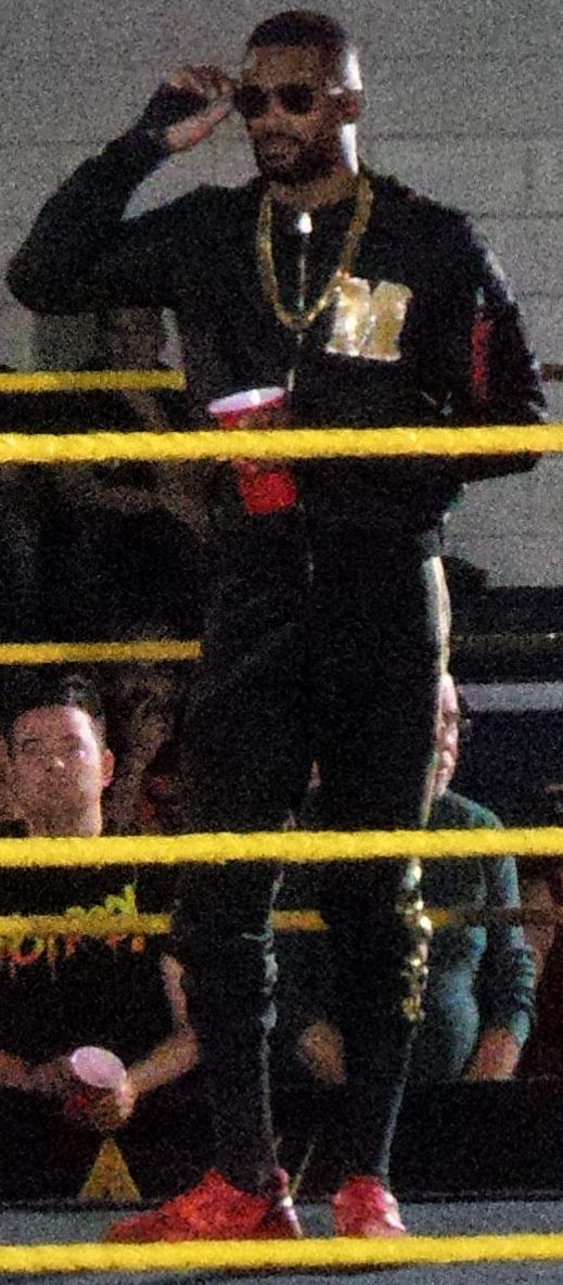 P_20170505_193441_002